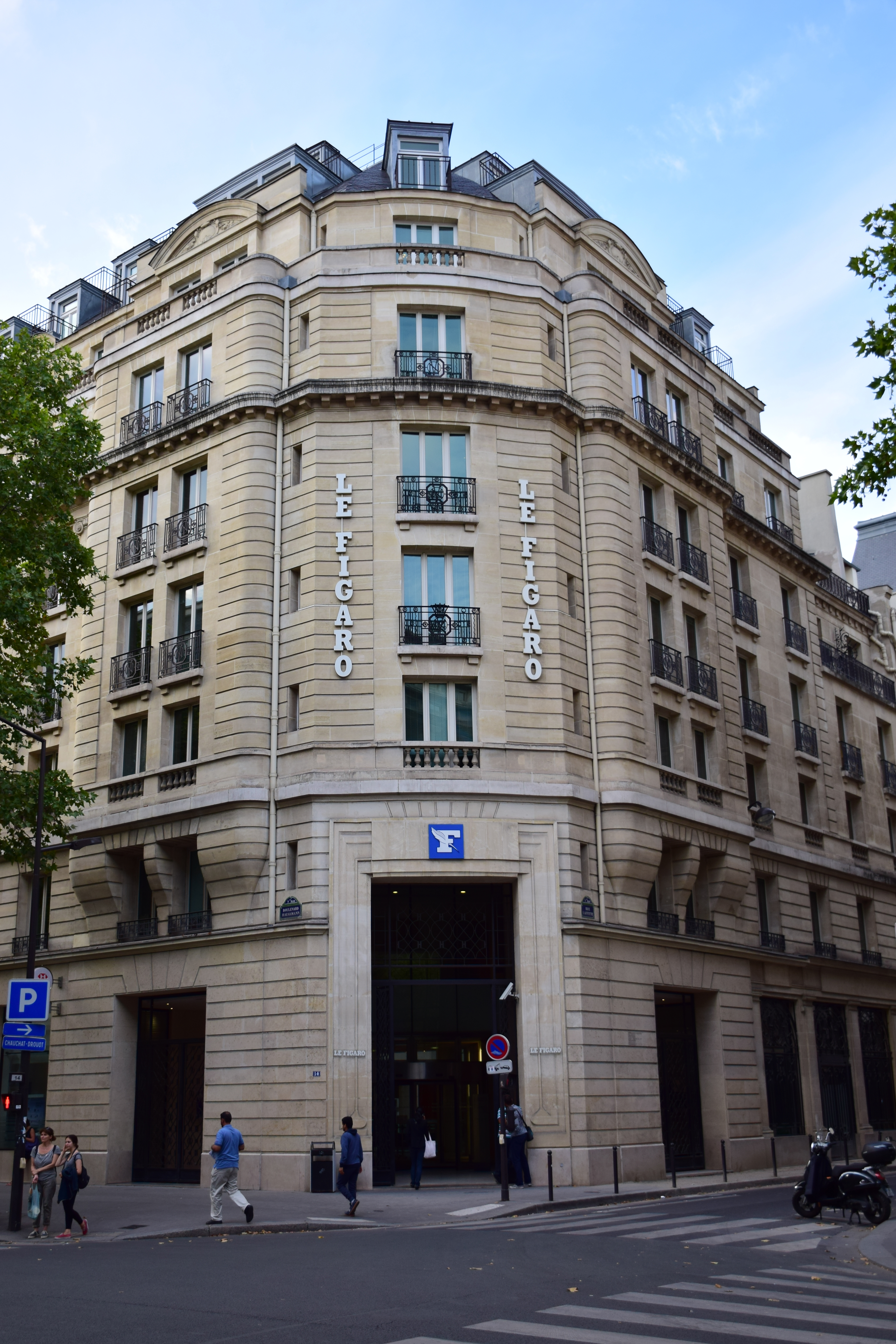 Siège du Figaro, au 14 boulevard Haussmann à Paris (France).